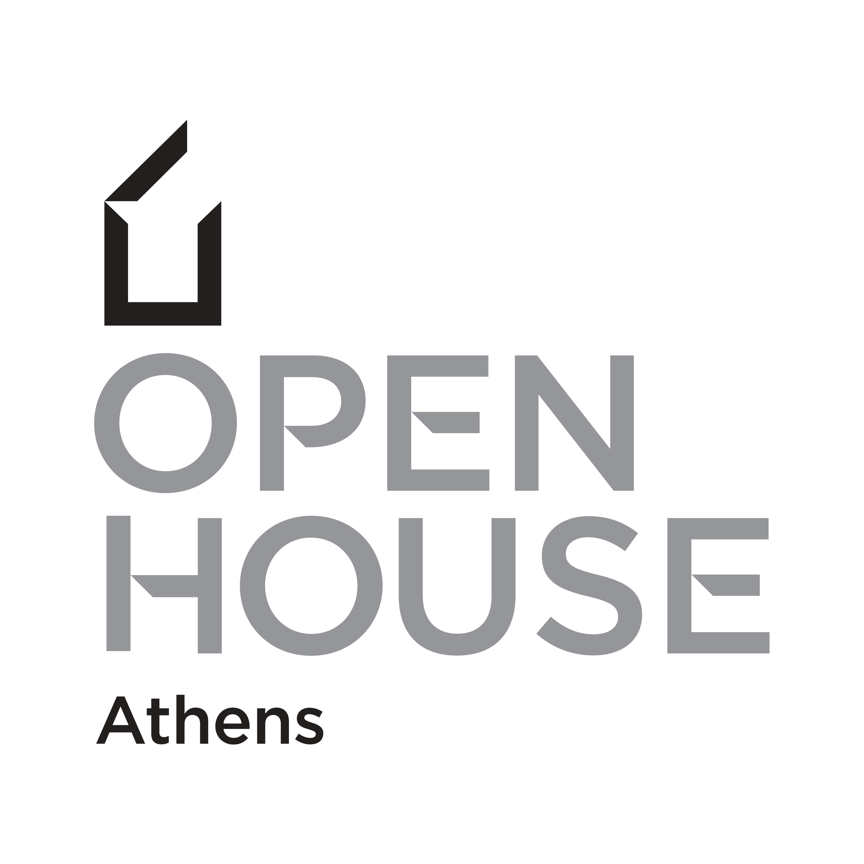 Open House Athens logo designed by Beetroot